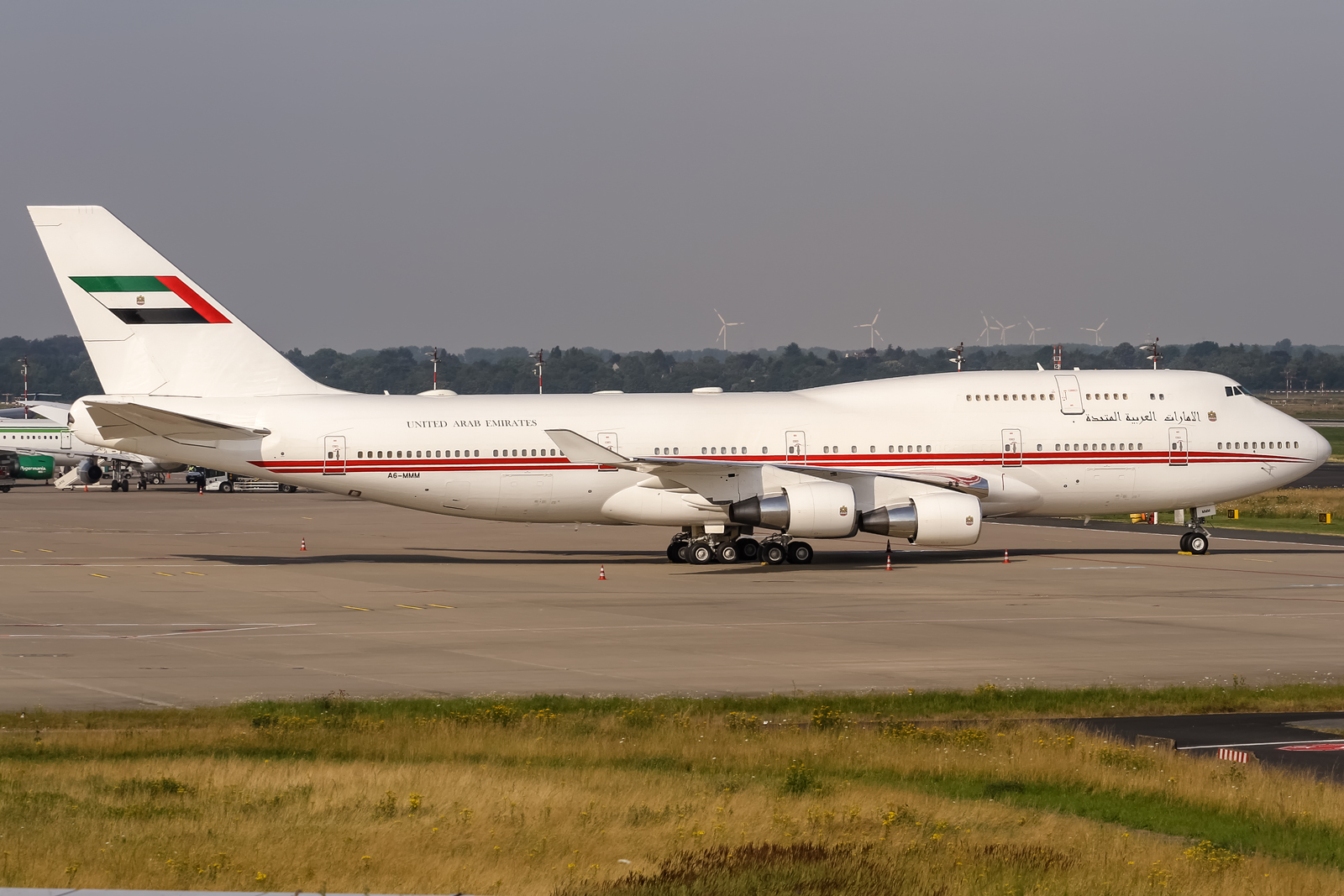 A6-MMM Dubai Air Wing / Royal Flight Boeing 747-422 @ Düsseldorf (DUS / EDDL) / 21.07.2016